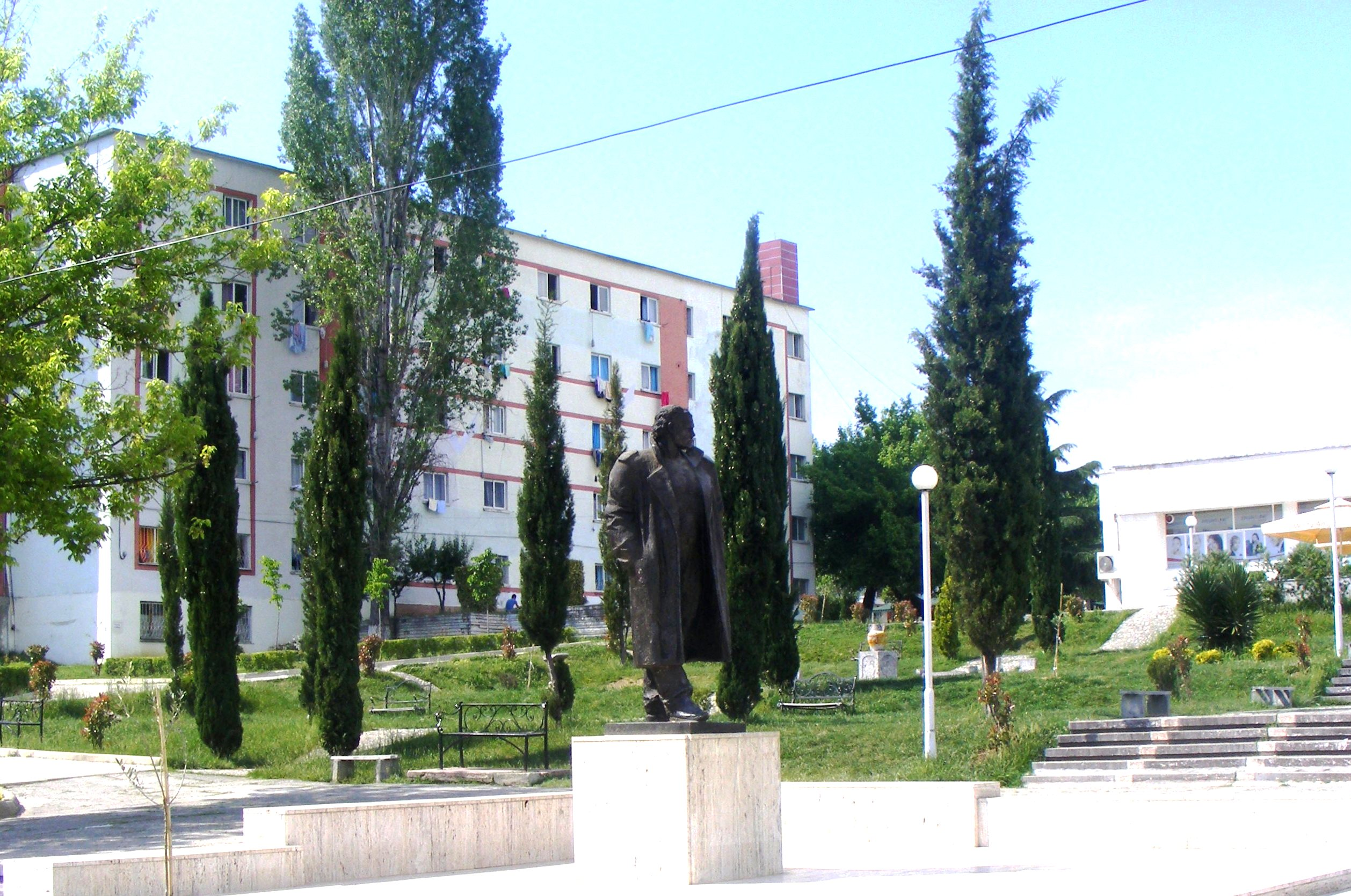 Shtatorja e Azem Hajdarit në Qytet Studenti në Tiranë